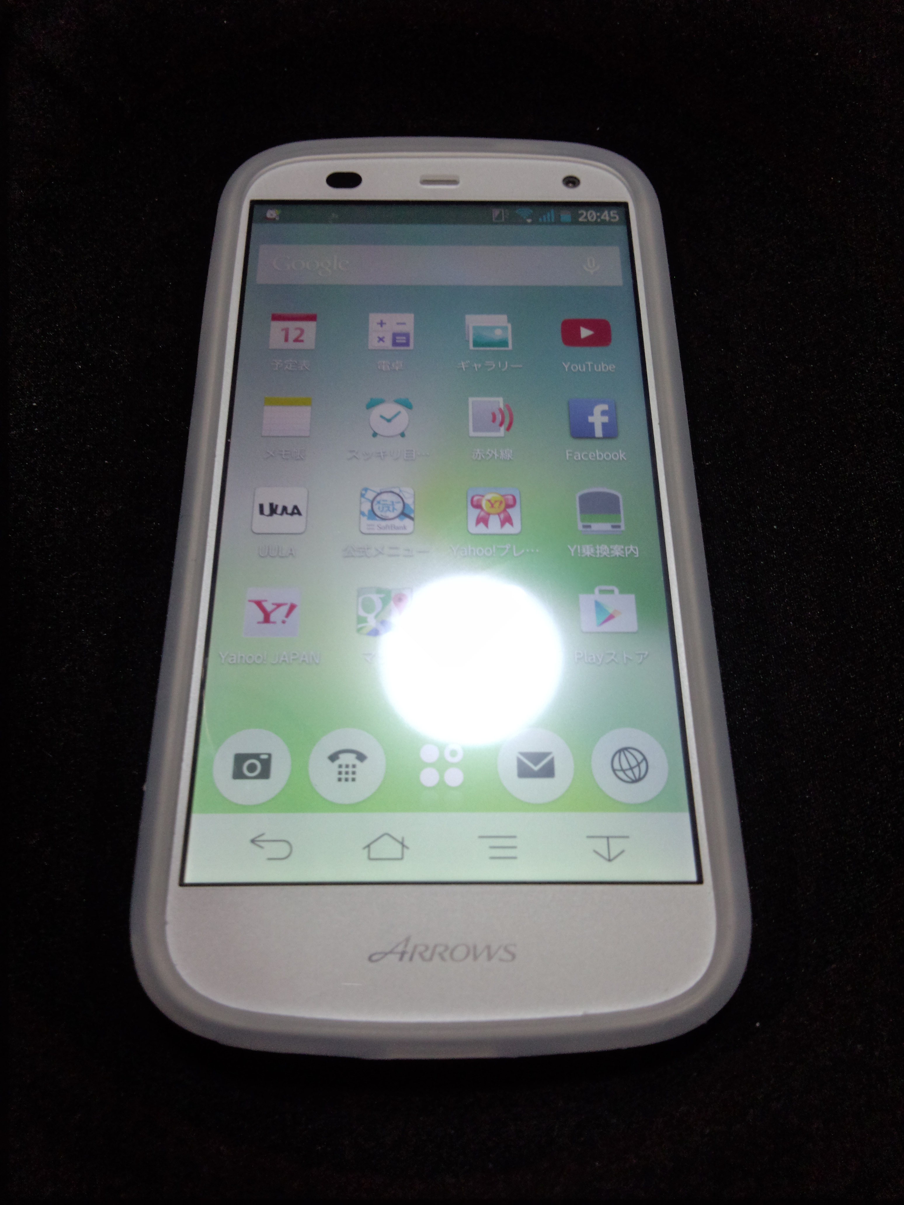 携帯端末本体の撮影画像